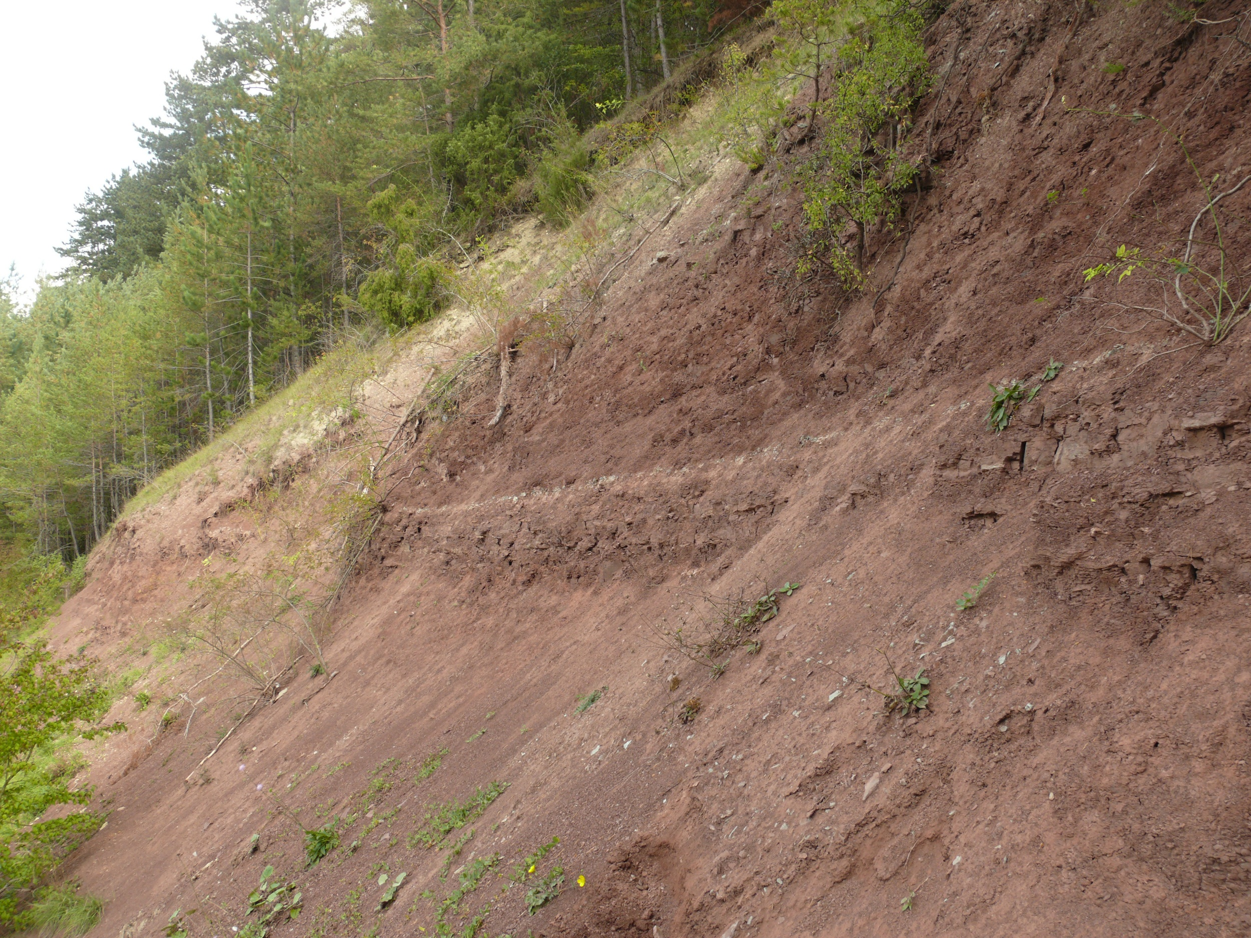 Röt-Formation des Oberen Buntsandsteins, Hardheim, Bauland, Deutschland